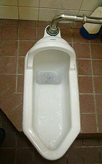 TOTO C375AV +Calmic